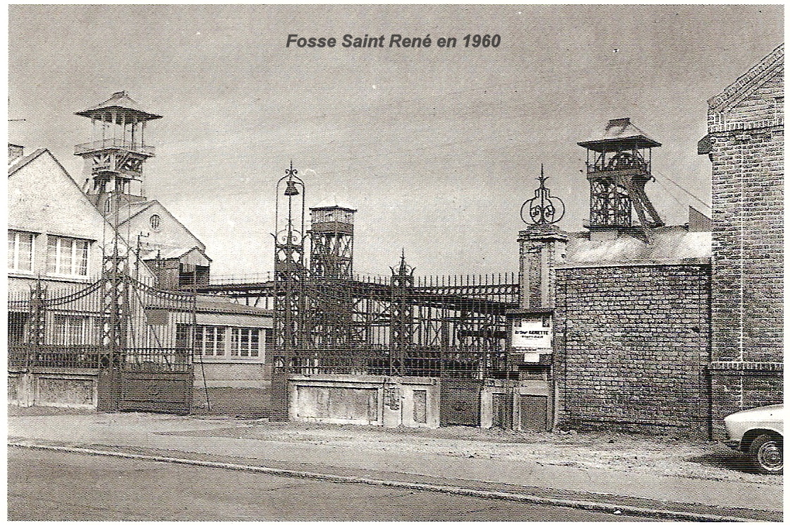 Fosse Saint René de Guesnain aujourd'hui disparue